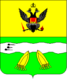 Герб Ямпіля 1796 року